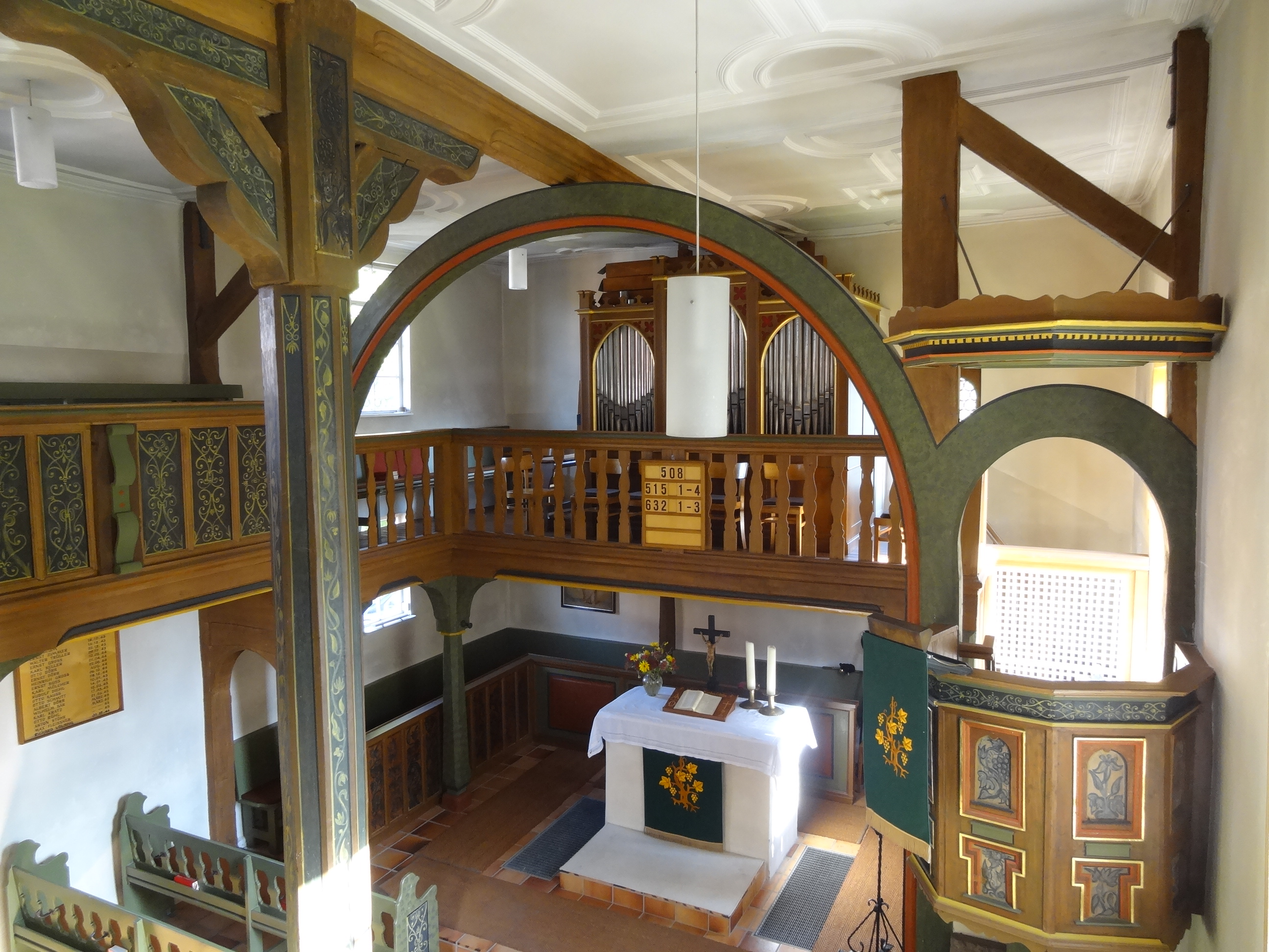 Evangelische Kirche Lardenbach